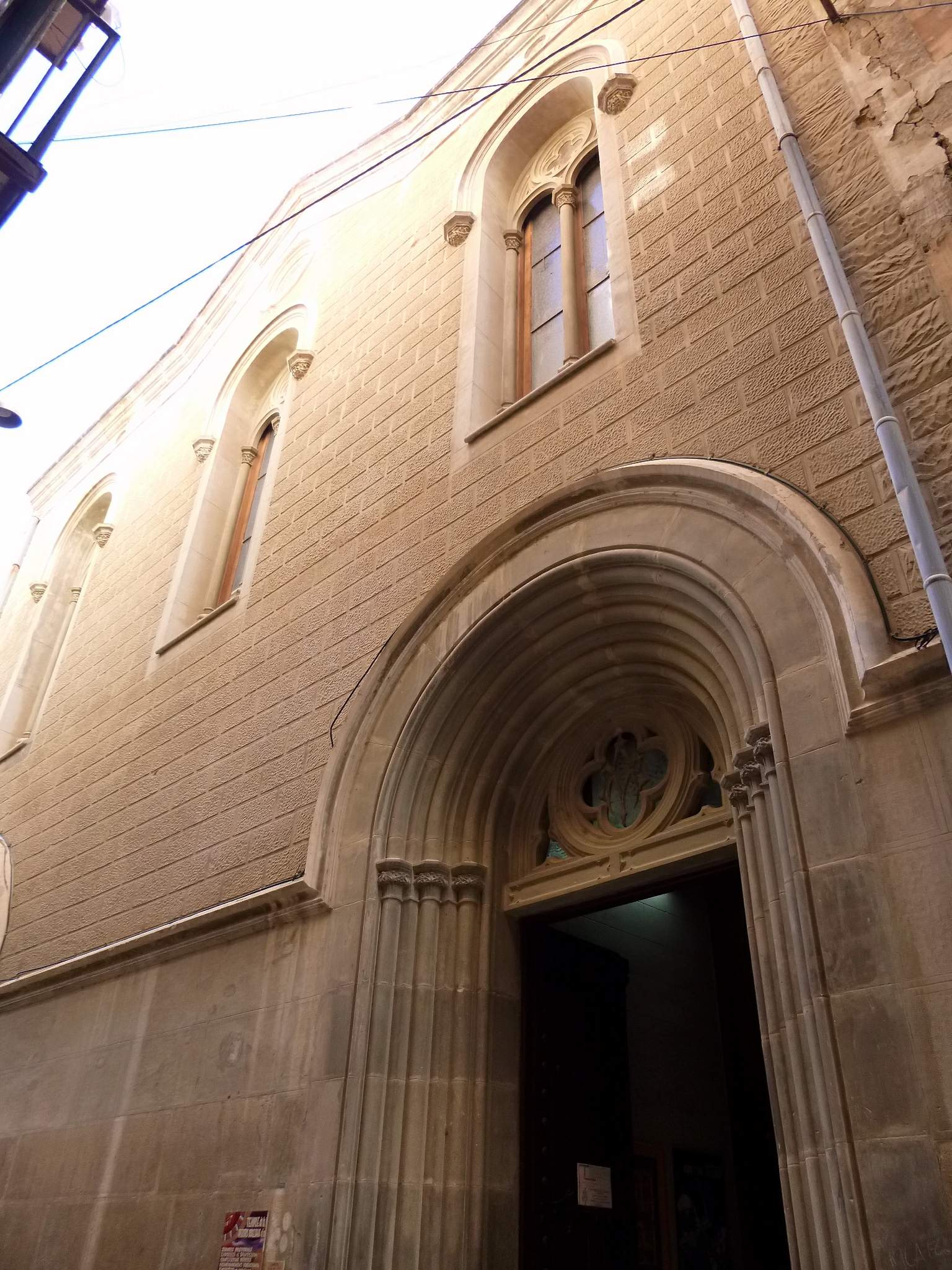 Templo de la Reparación (Tortosa, Tarragona)